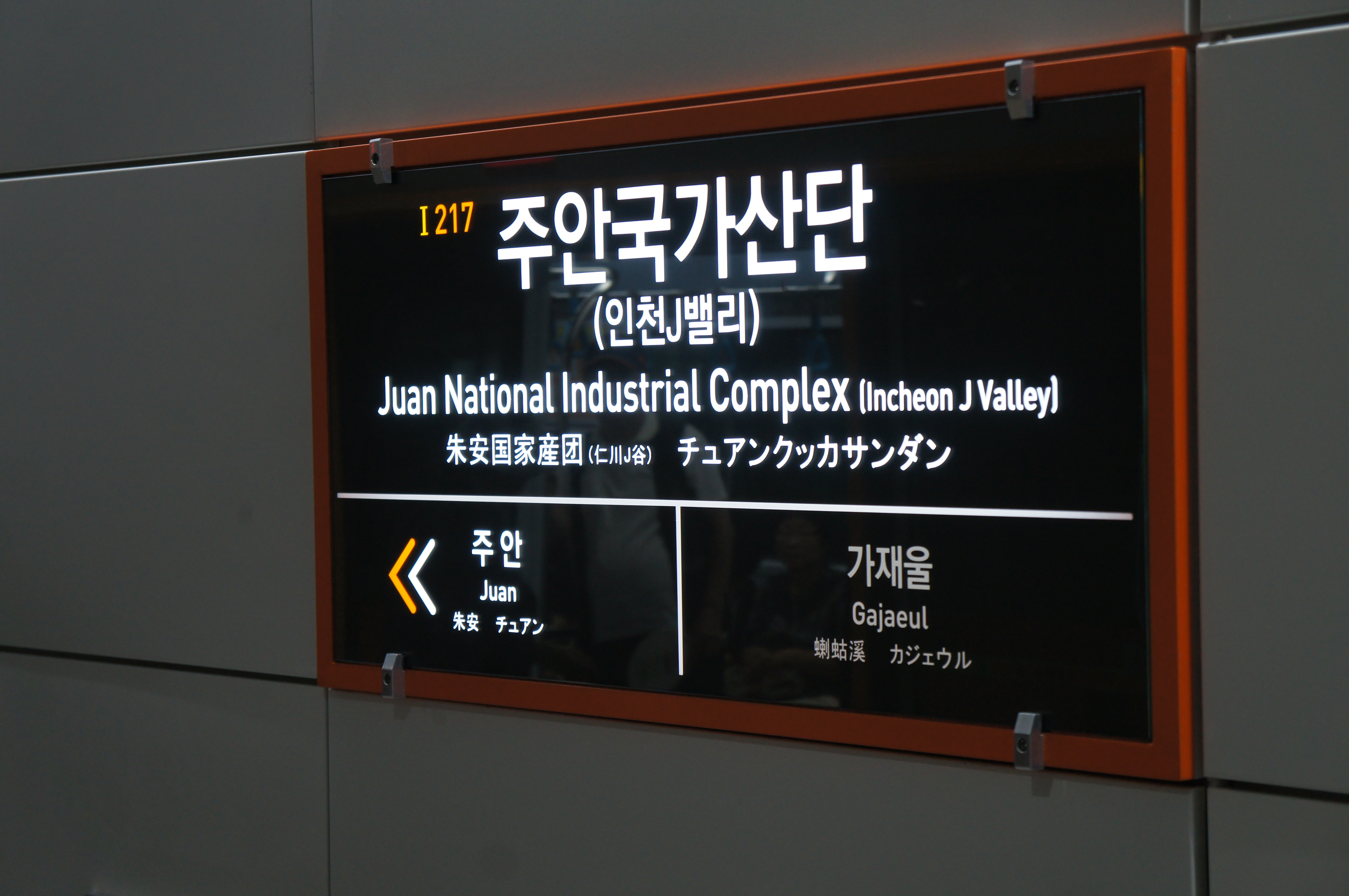 주안국가산단역 역명판